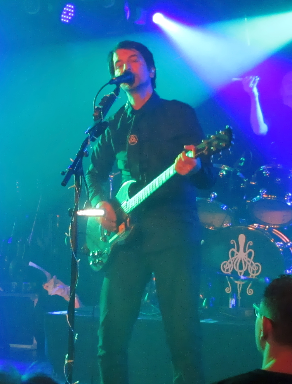 Sel Balamir (Amplifier) live @ Colos-Saal Aschaffenburg